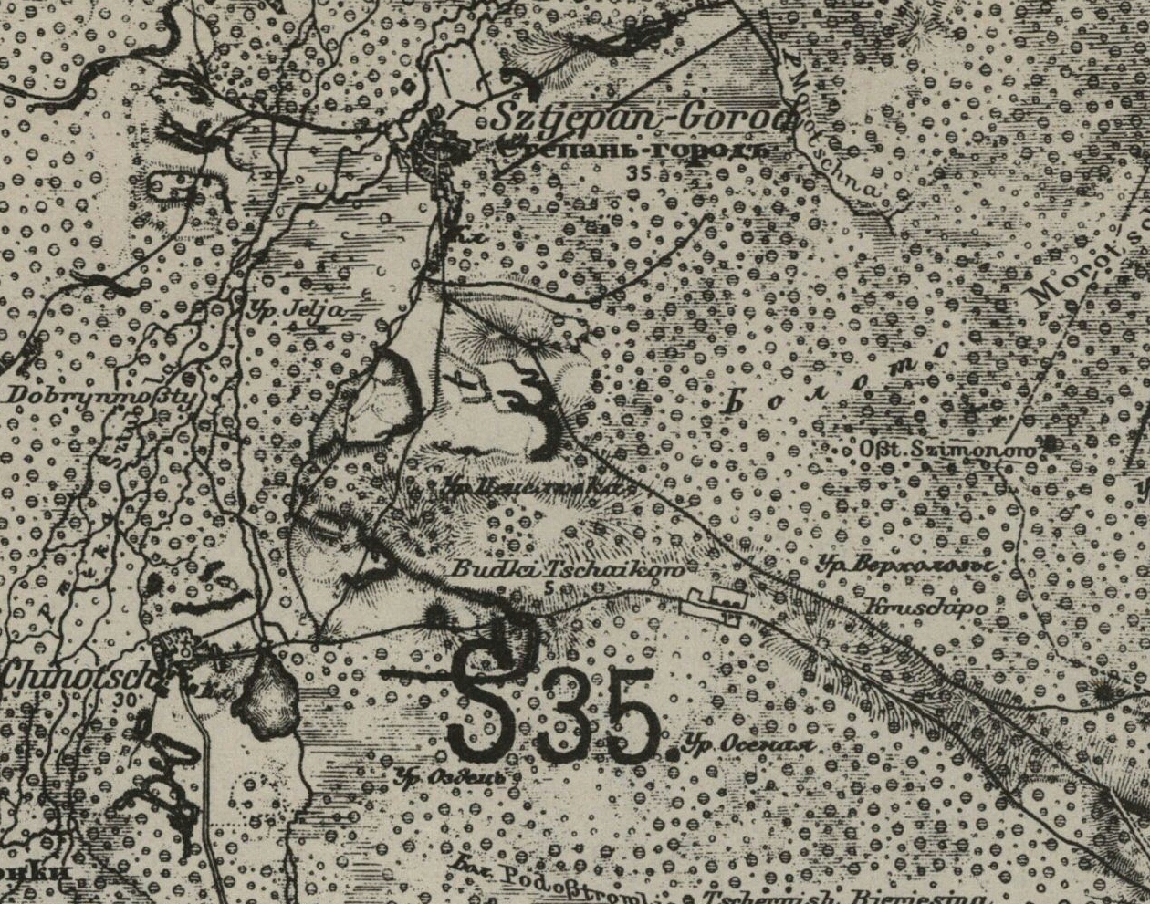 Степангород на німецькій карті